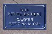 Een voorbeeld van een tweetalig (Frans-Catalaans) straatnaambord in Perpignan. Het is een foto die ik zelf gemaakt hebt en die iedereen vrij mag gebruiken.